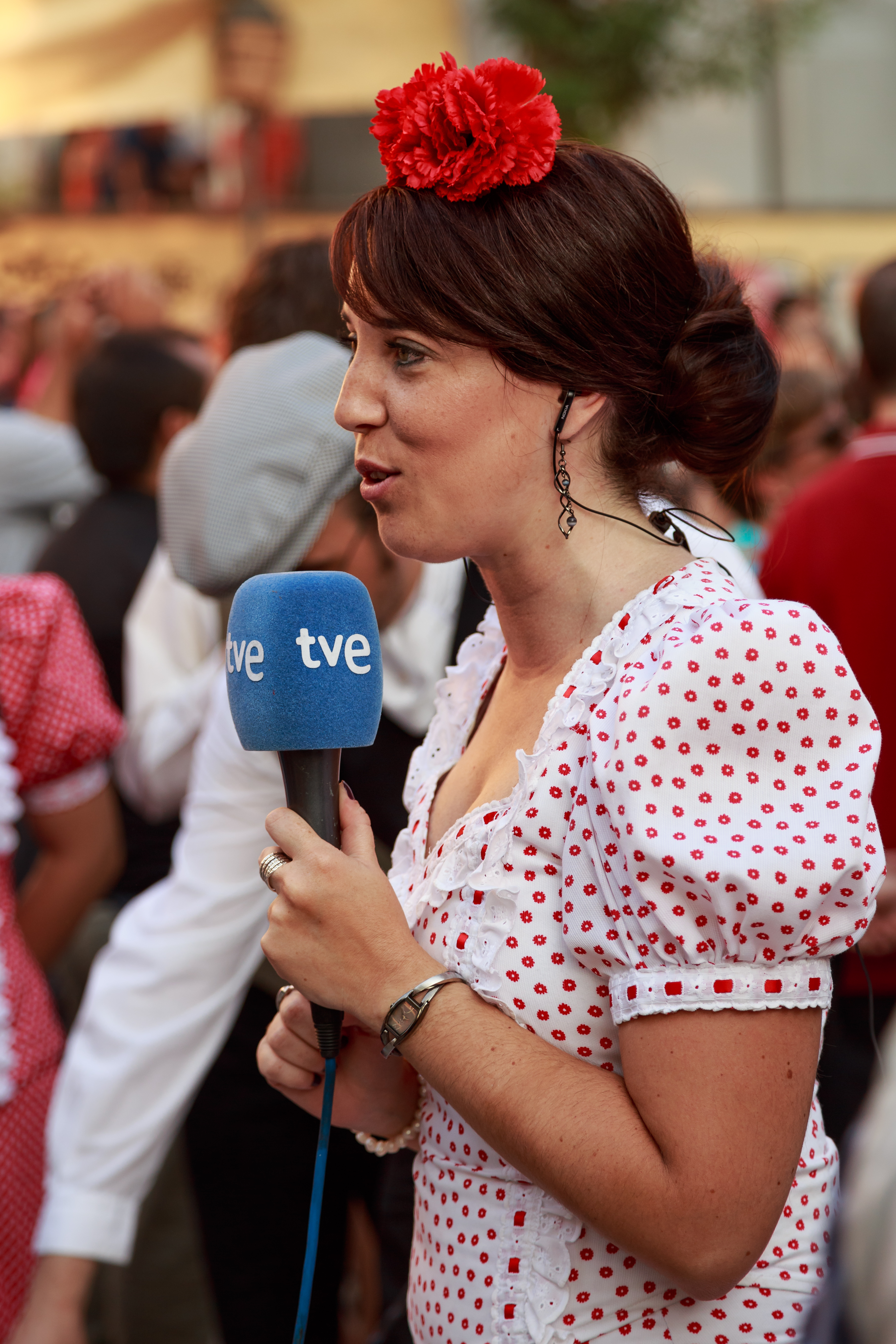 Sandra Muñoz Guerrero, reportera del programa "España Directo", vestida de chulapa en las vistillas. Fiestas de la virgen de la Paloma, Madrid.